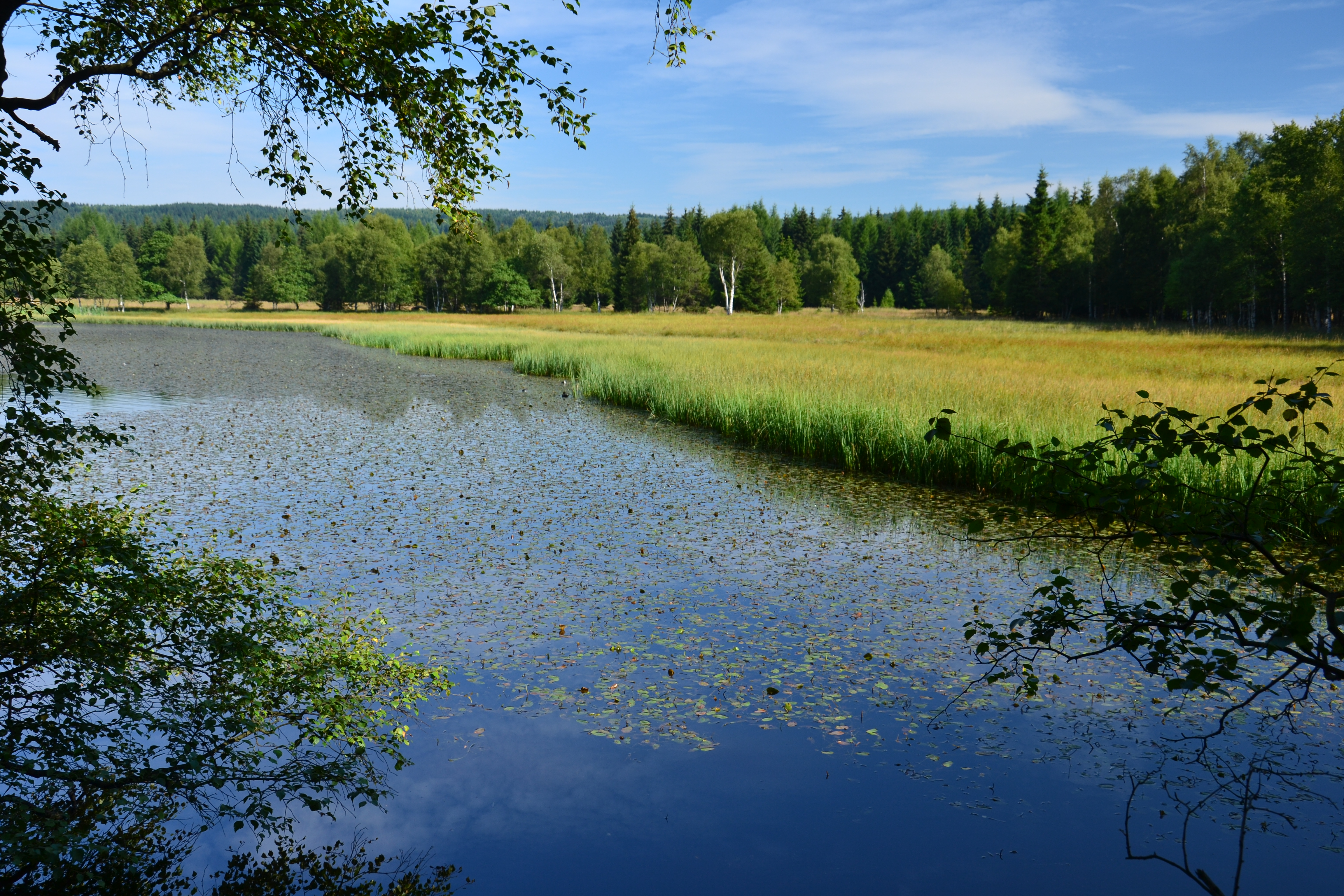 PP Na Loučkách II - Starý rybník